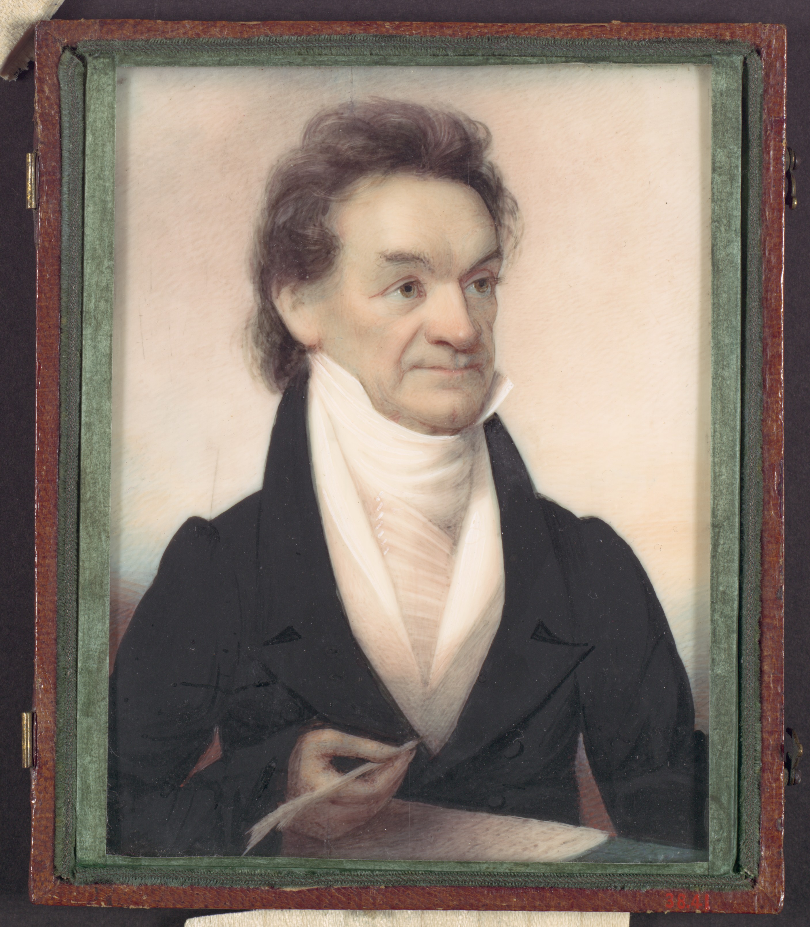 Painting, miniature; Paintings